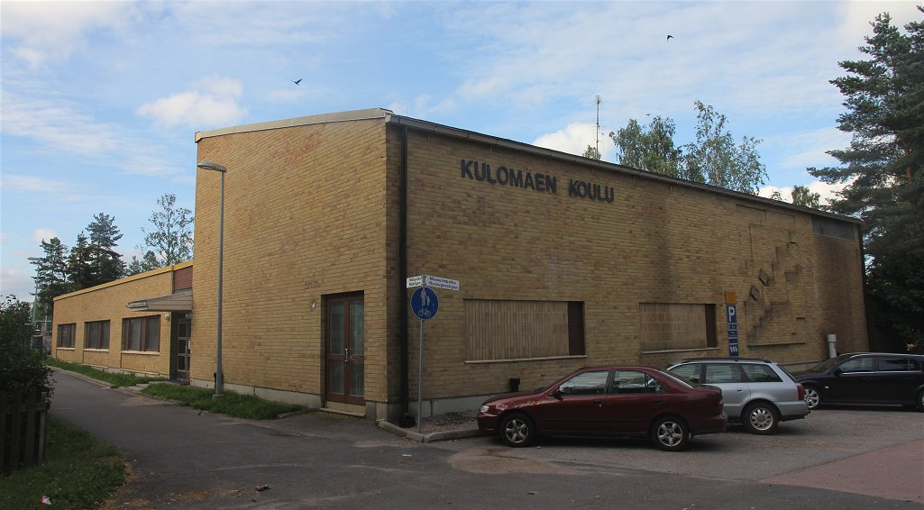 Kulomäen koulu, syyslukukaudesta 2014 alkaen Vierumäen koulun Kulomäen opetuspiste, onVantaan kaupungin Korson kaupunginosan Kulomäen asuinalueella toimiva suomenkielinen alakoulu.